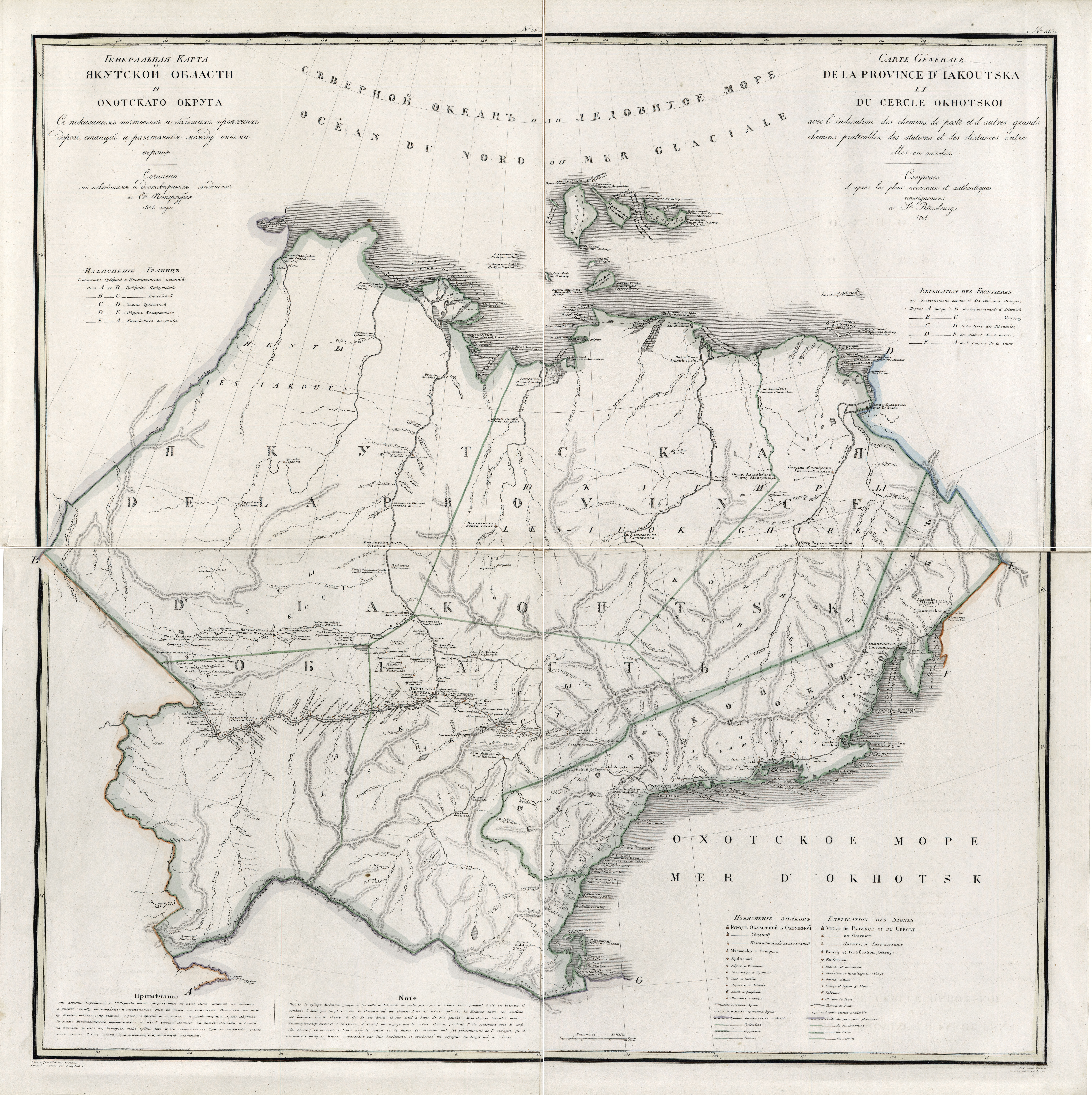 Карта Якутской области и Охотского округа